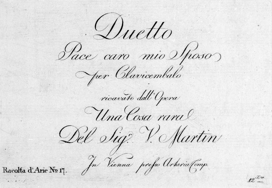 Vicente Martín y Soler (1754? bis 1806), Lorenzo Da Ponte (1749–1838): Duett Pace, mio caro sposo aus dem Dramma giocoso Una cosa rara (1786) für Cembalo. Artaria, Wien.